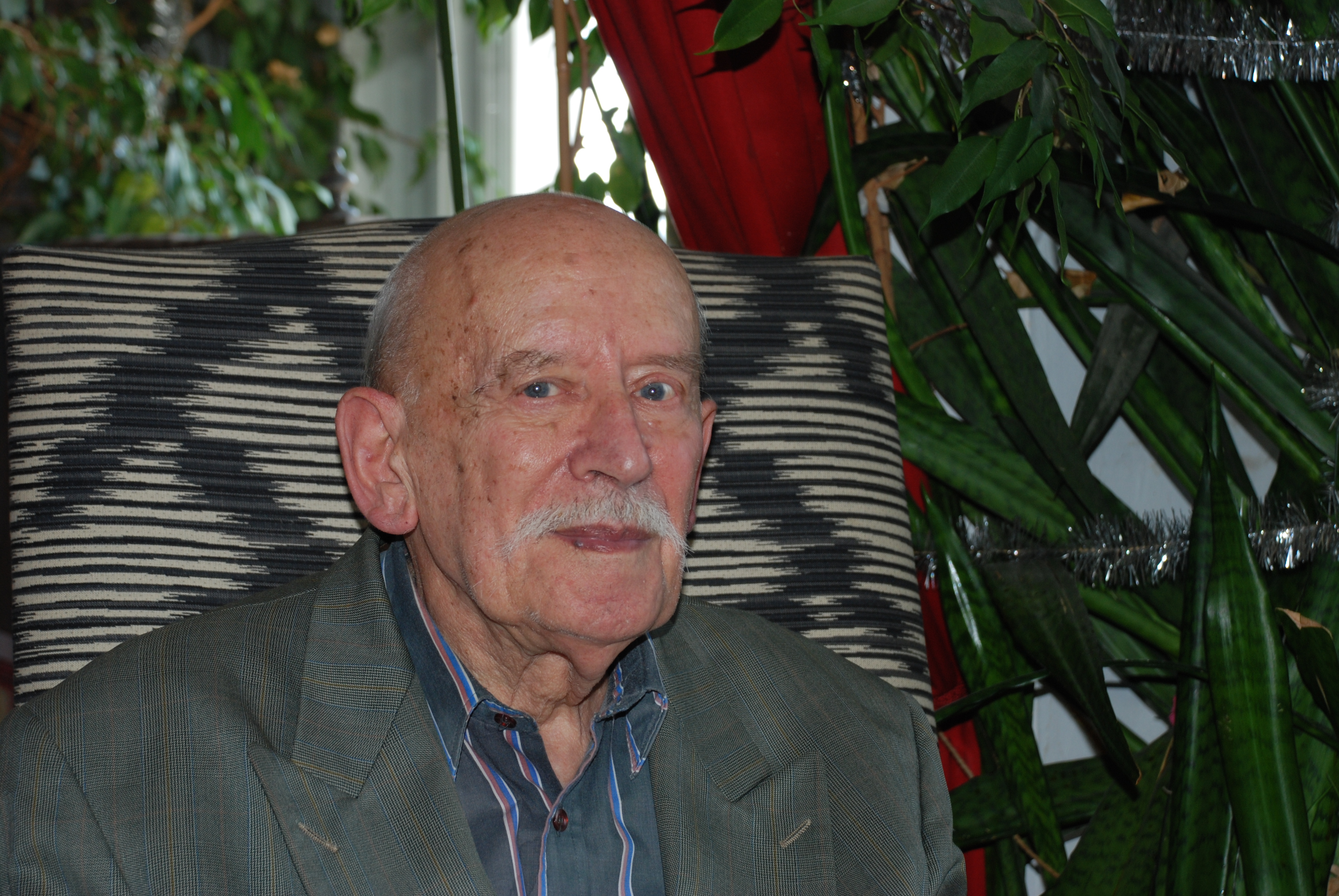 Je suis l'auteur de cette photographie de Jean Prieur prise à son domicile au mois d'août 2008. Je laisse cette image libre de droits.